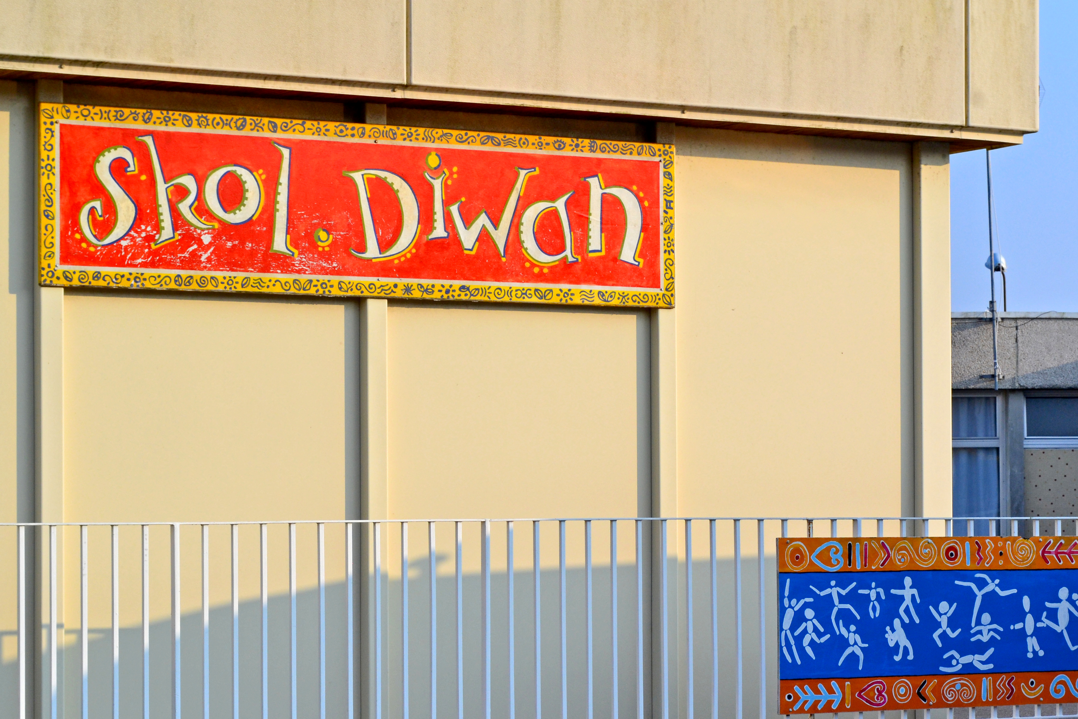 Ecole Diwan de Saint-Pol-de-Léon.